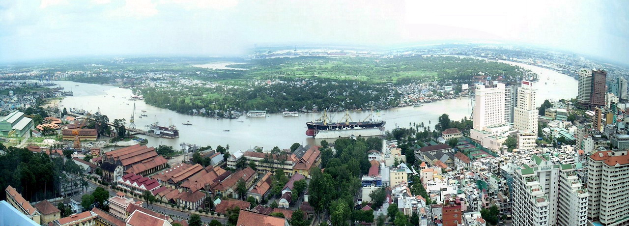 Saigon en panoramique